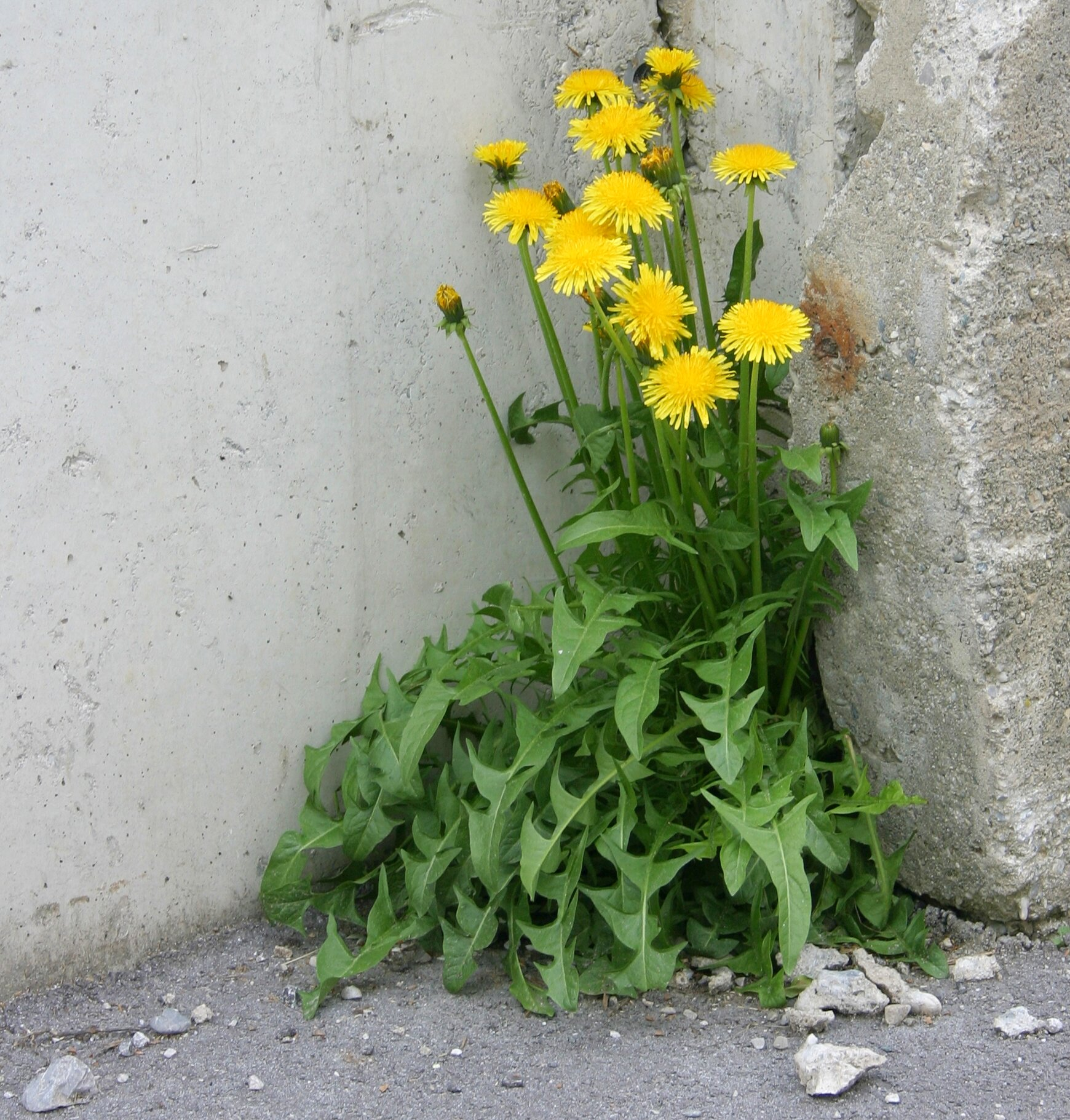 Löwenzahn wächst aus Mauerritze